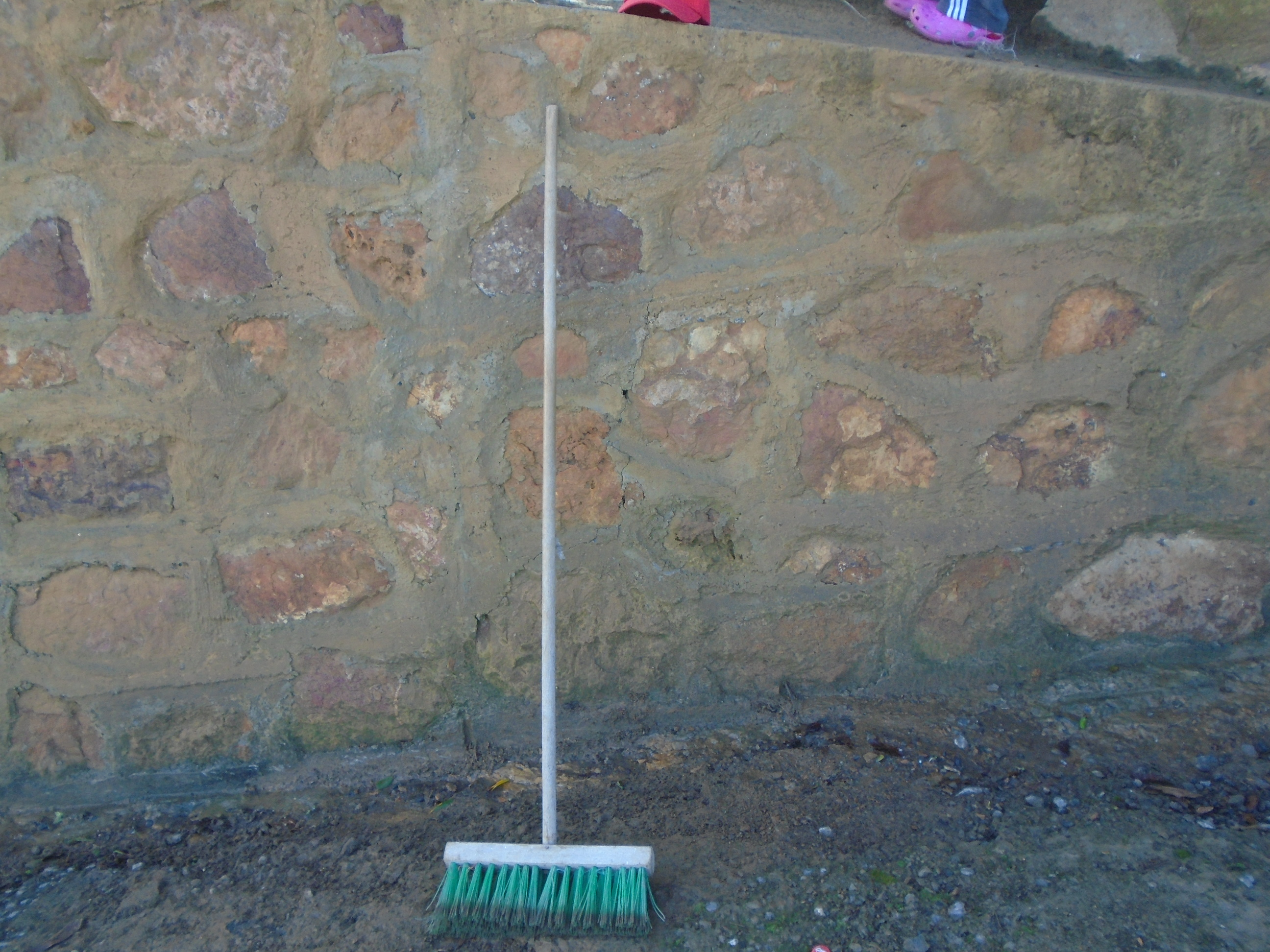 Una escoba.